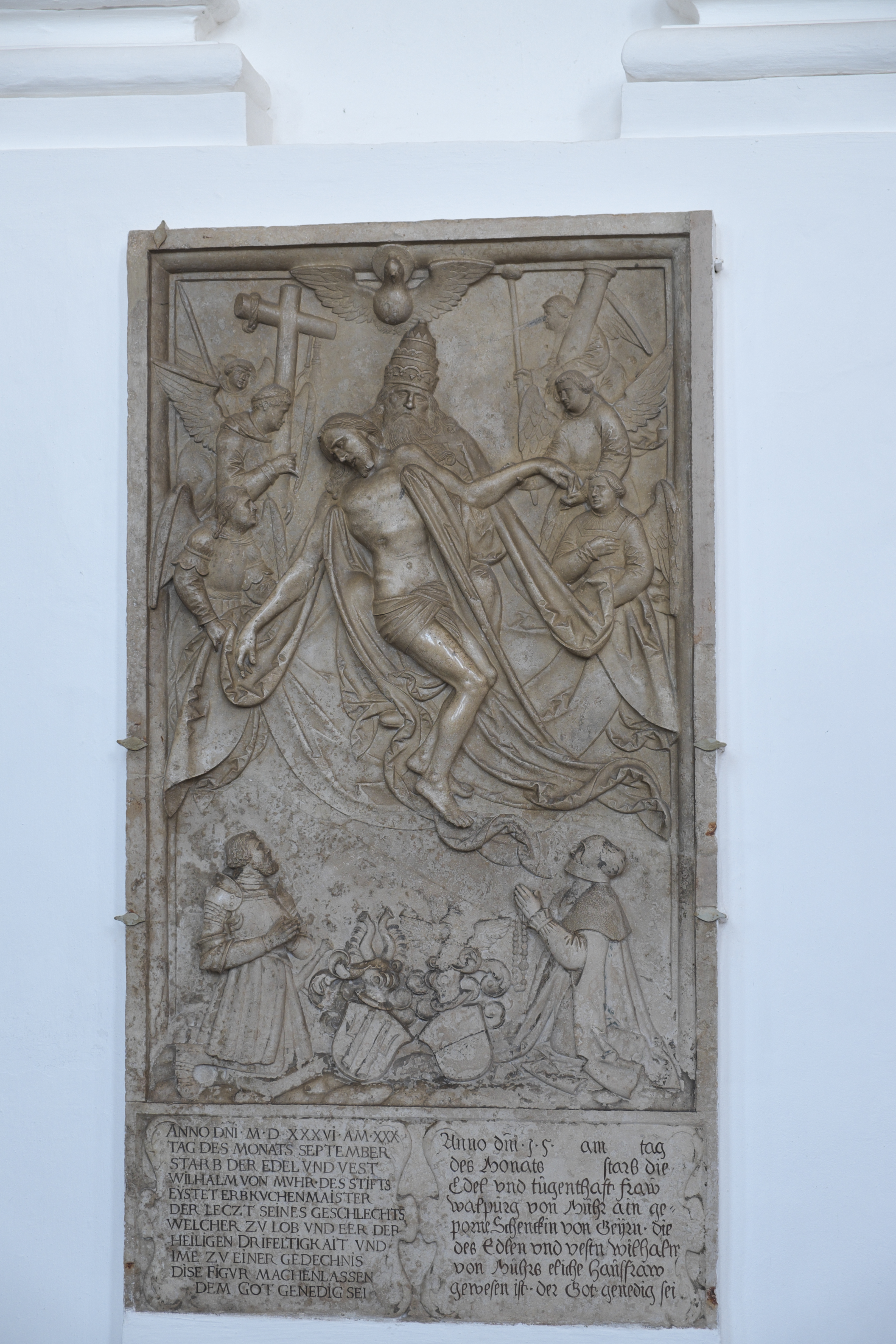 Wallfahrtskirche Heilig Kreuz, ehemalige Klosterkirche des Klosters Bergen in Bergen, einem Ortsteil von Neuburg an der Donau im Landkreis Neuburg-Schrobenhausen (Bayern), Epitaph für Wilhelm von Muhr († 1536) und seine Frau Walburga im Langhaus, von Loy Hering nach einem Holzstich von Albrecht Dürer, von 1536-42; Darstellung: Gnadenstuhl